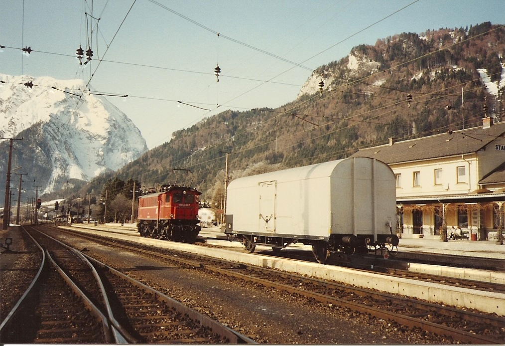 1245.531 holt den von einem Regionalzug mitgeführten Milchwagen vom Durchgangsgleis in Stainach-Irdning ab.